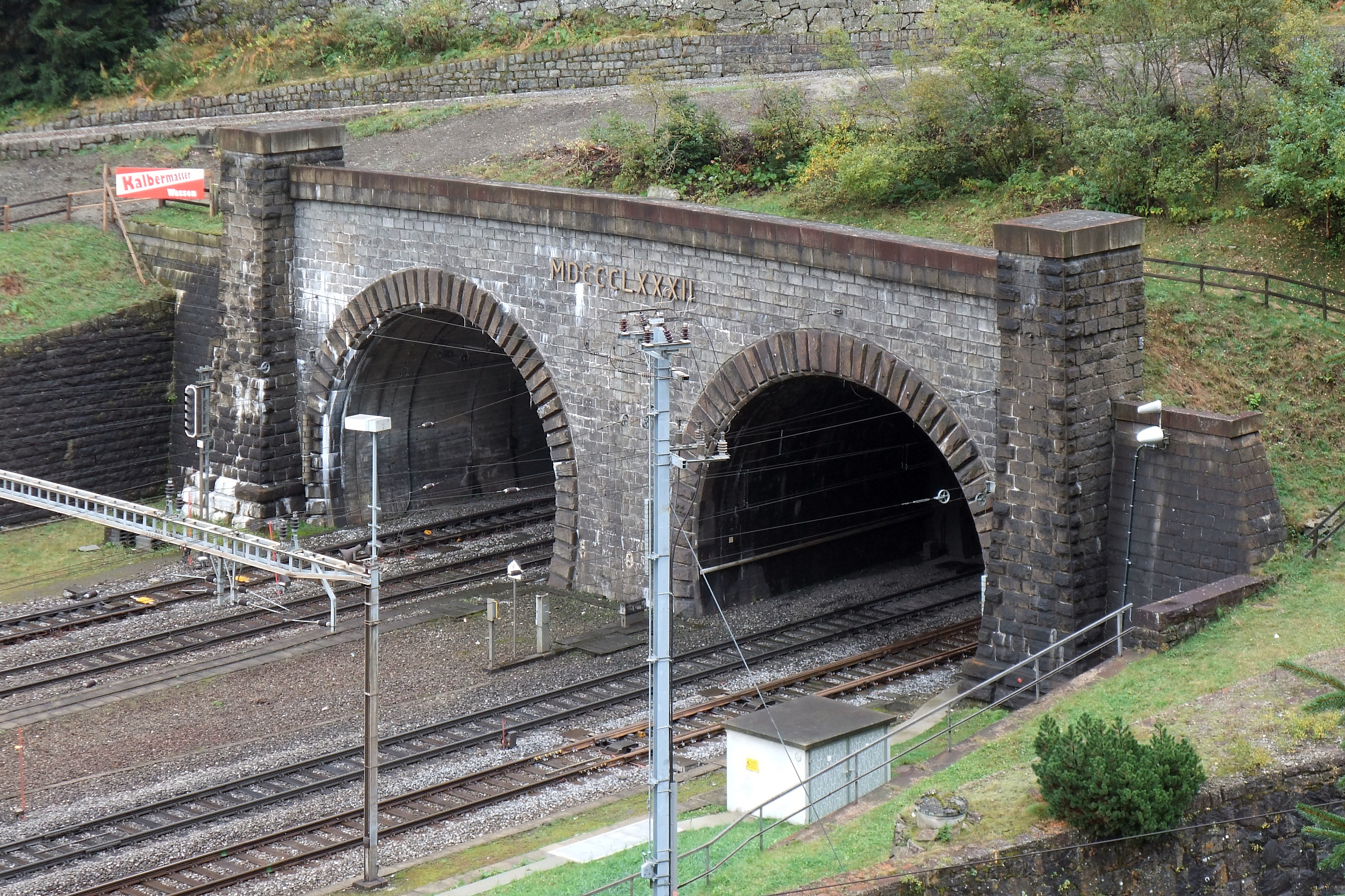 Göschenen, il portale nord del traforo del Gottardo.